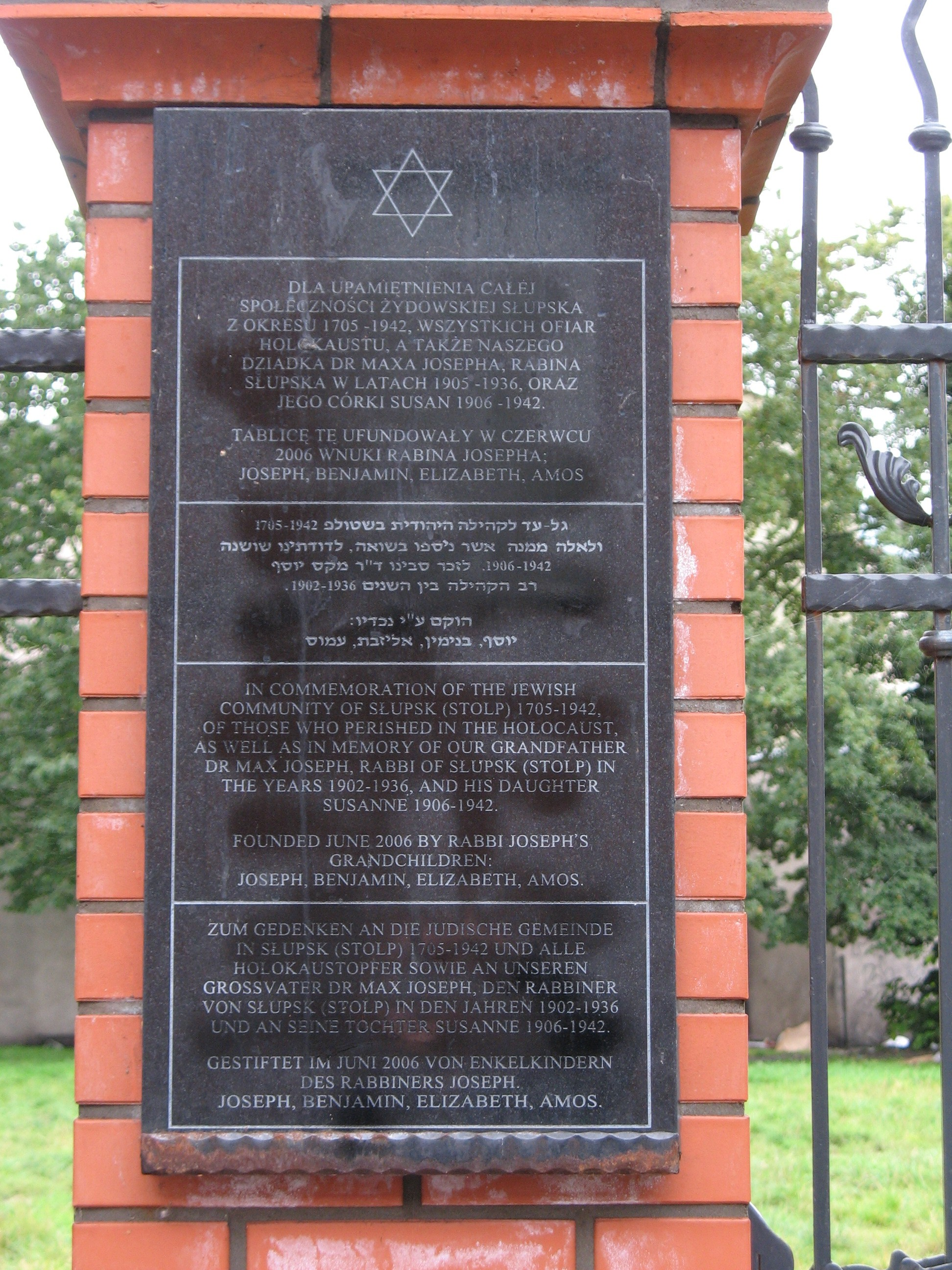 Tablica pamiątkowa umieszczona na rekonstrukcji ogrodzenia słupskiej symagogi.